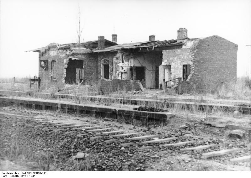 ADN-ZB/Donath Deutschland (sowjetische Besatzungszone) Der während des II. Weltkrieges völlig zerstörte Bahnhof Reitwein/Bezirk Frankfurt(Oder). Aufnahme 1945